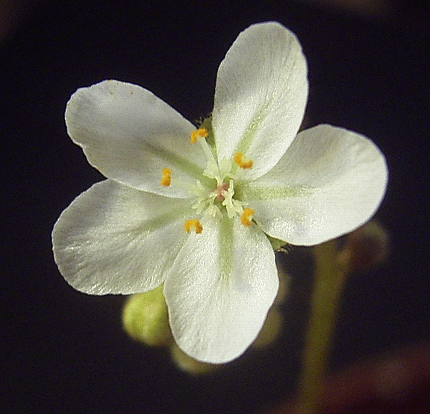 Drosera kenneallyi flora